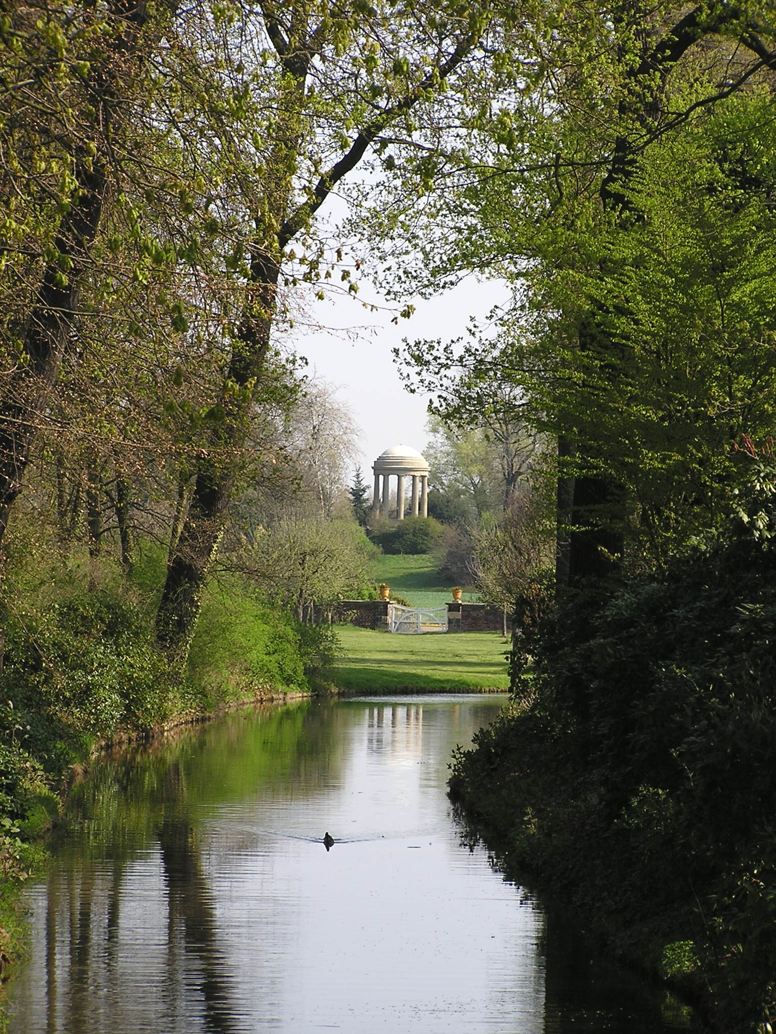 Wörlitzer Park am 24. April 2005, Blick auf Venustempel, Darstellung der Form "Englischer Garten".